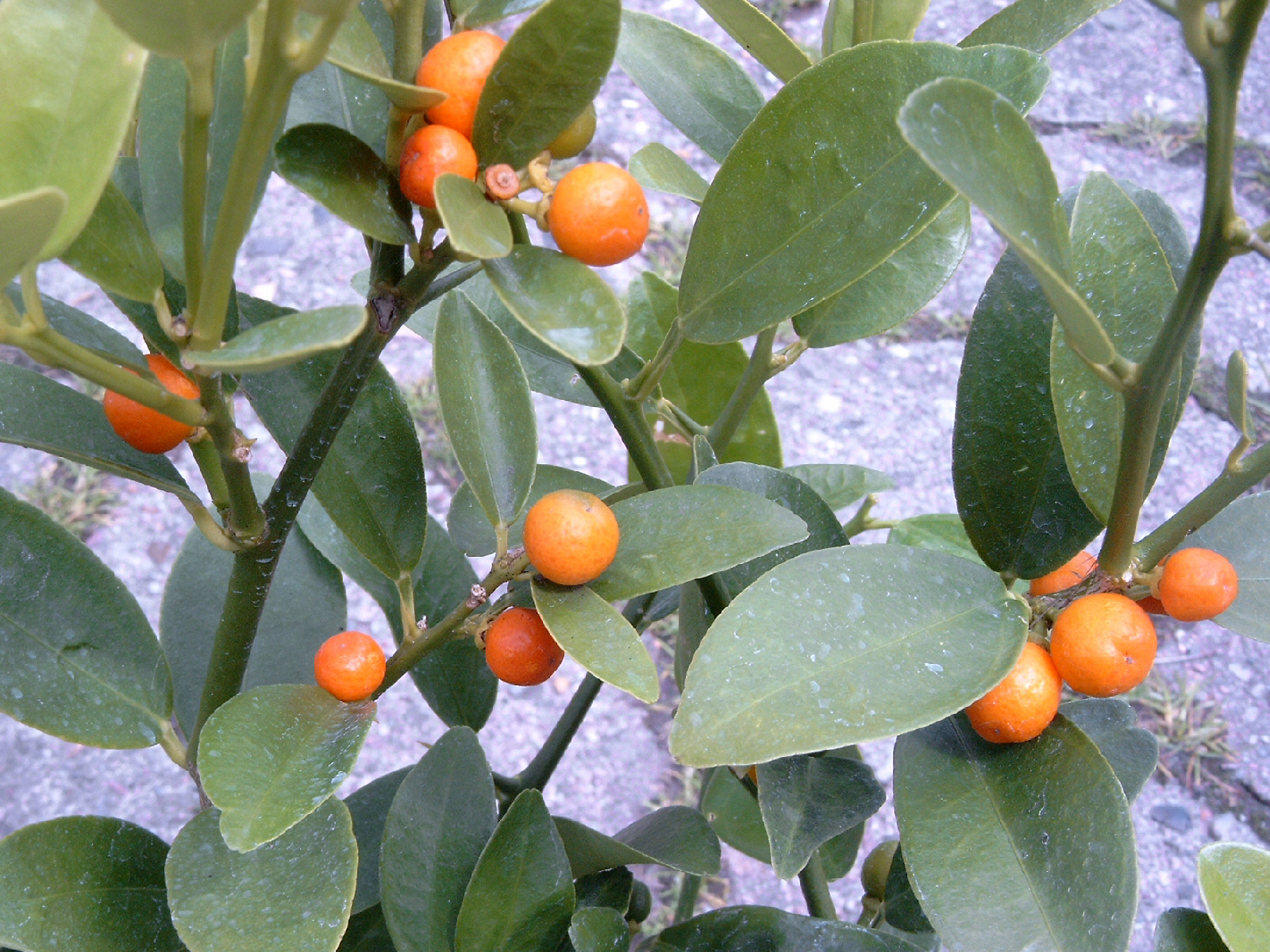 Wilde Hongkong Kumquat